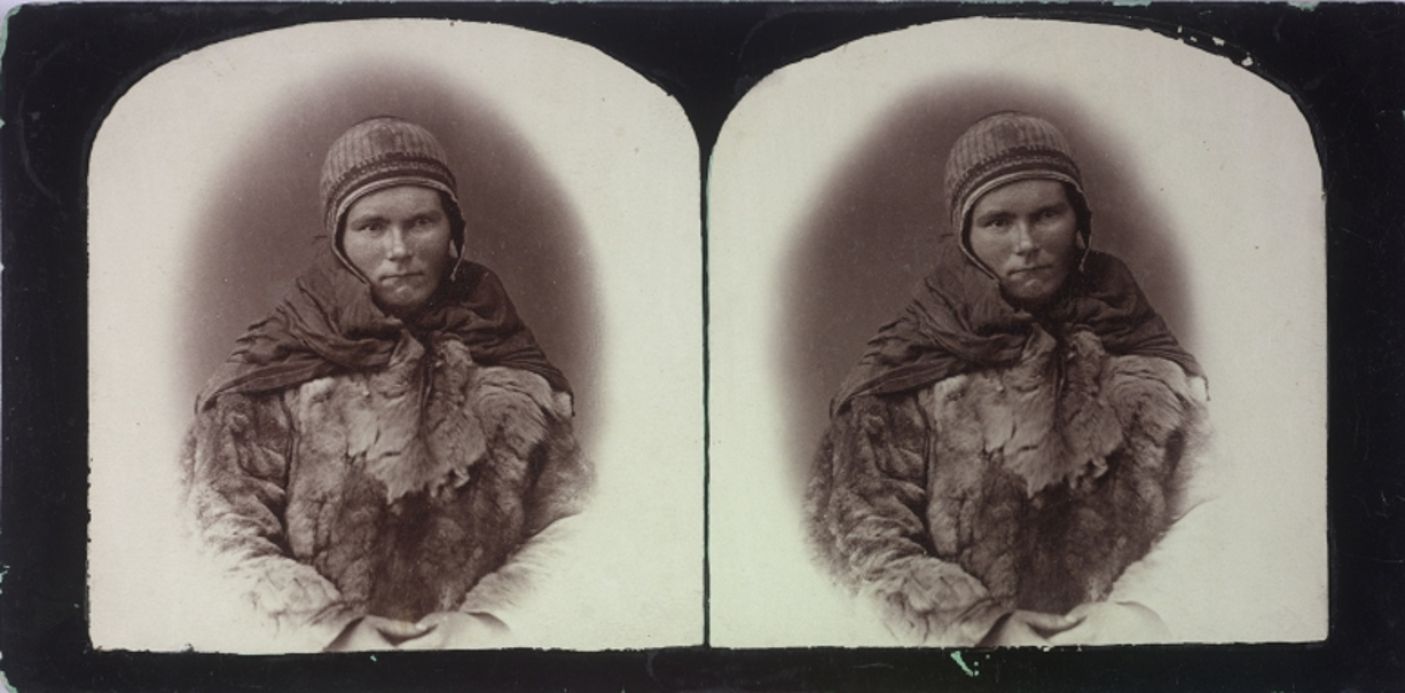 Österreichisch- Ungarische Nordpolexpedition 1872 Auf der Fahrt des Schiffes 'Isbjörn': Bildnis einer Lappländers in regionaler Kleidung mit Pelzjacke und Wollhaube. Stereofotografie.